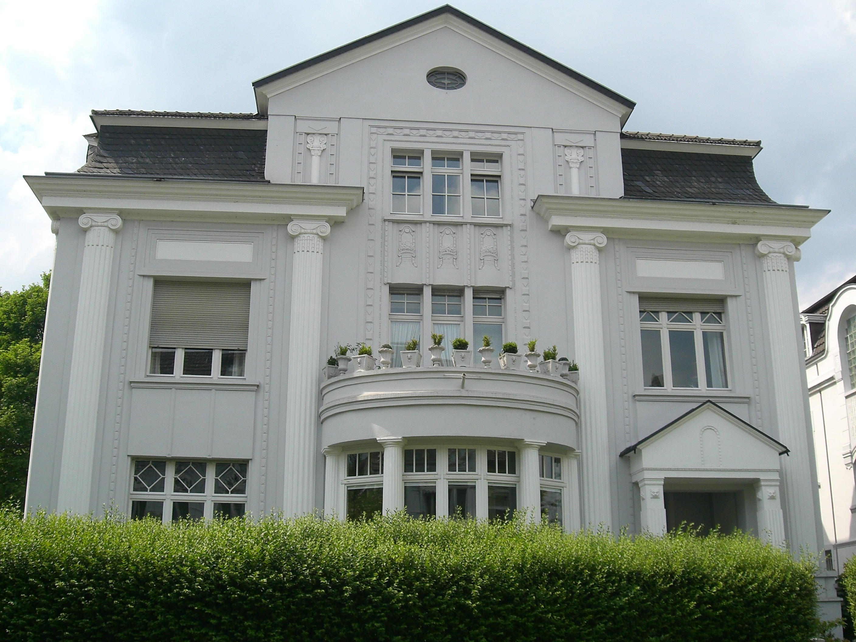 Villa Bagel - Friedrichstraße 62